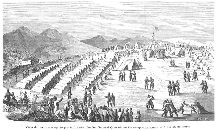 Vista del terreno ocupado por la división del Sr. General Quesada en los campos de Amaniel el día 10 de mayo.